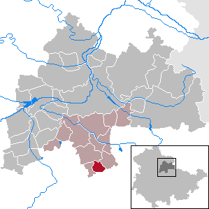 Großmölsen in Thuringia - District Sömmerda